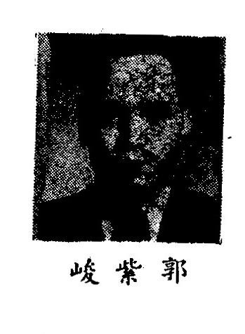 中文（中国大陆）: 制憲國民大會代表